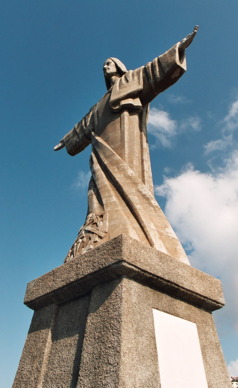 statue du Christ-Roi de Garajau